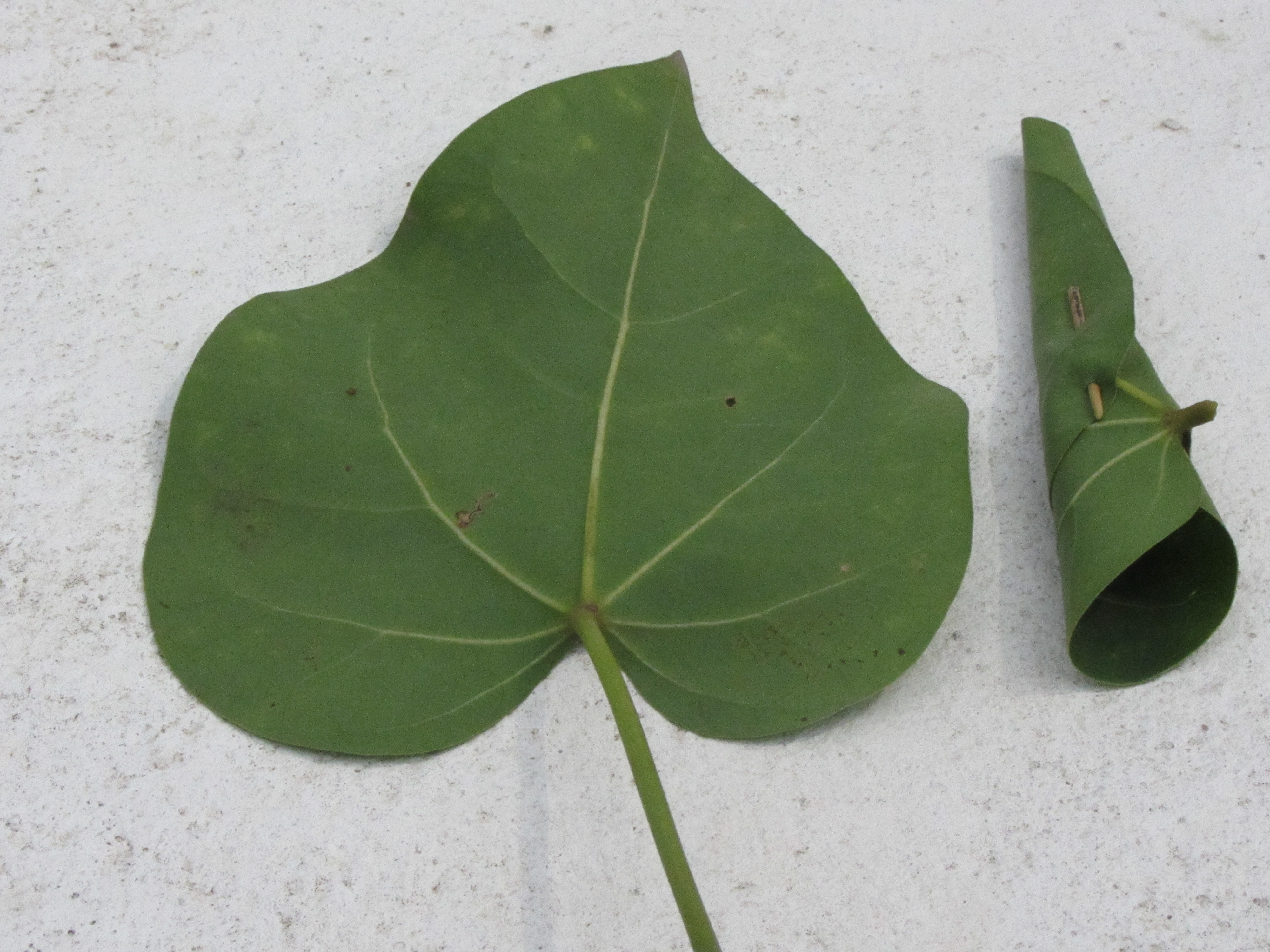 Own shot. A whistle made of Portia-leaf. பூவரச இலையால் செய்யப்பட்ட ஊதல். சிறுவர் நாட்டுப்புற விளையாட்டு, ஊதல்